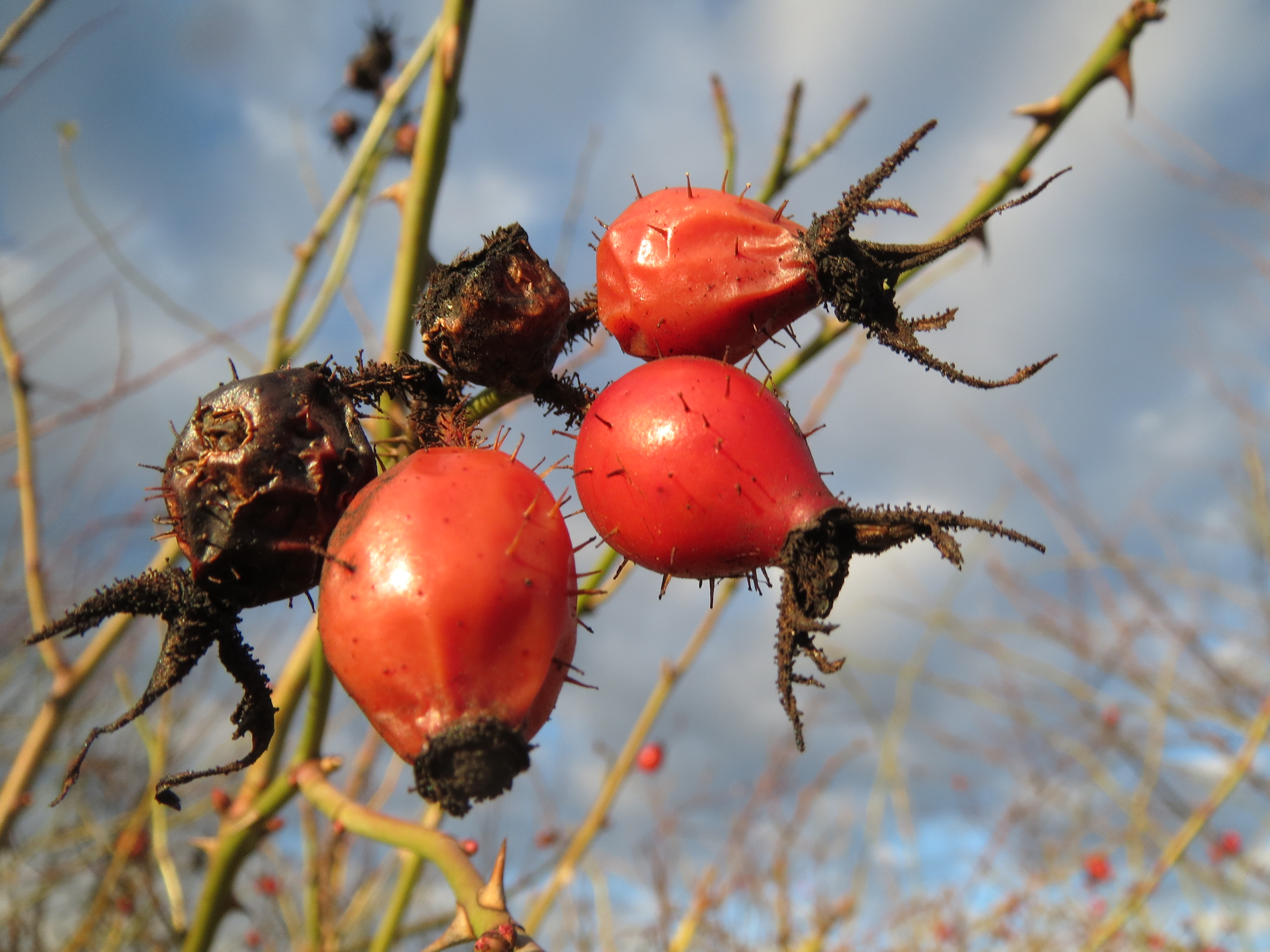 Hagebutten der Wein-Rose (Rosa rubiginosa) bei Reilingen